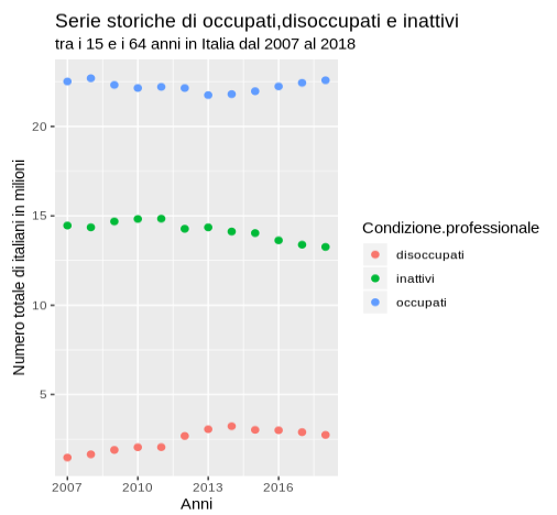 file realizzato con RStudio con dati Istat